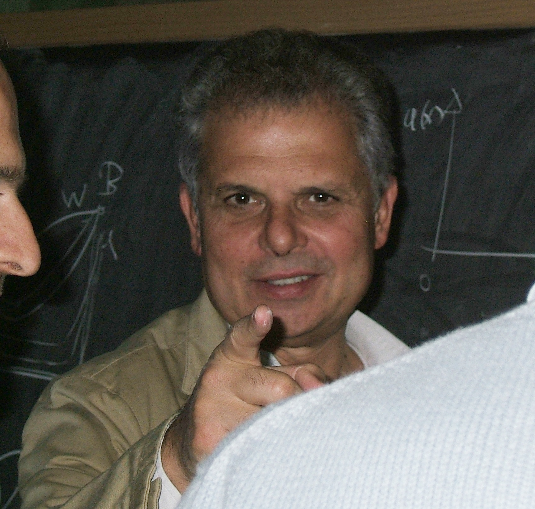 Paolo Marcellini - maggio 2007